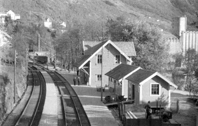 Vaksdal stasjon på Vossebanen/Bergensbanen. Foto: Enoch Djupdræt, fra billedbasen Marcus.